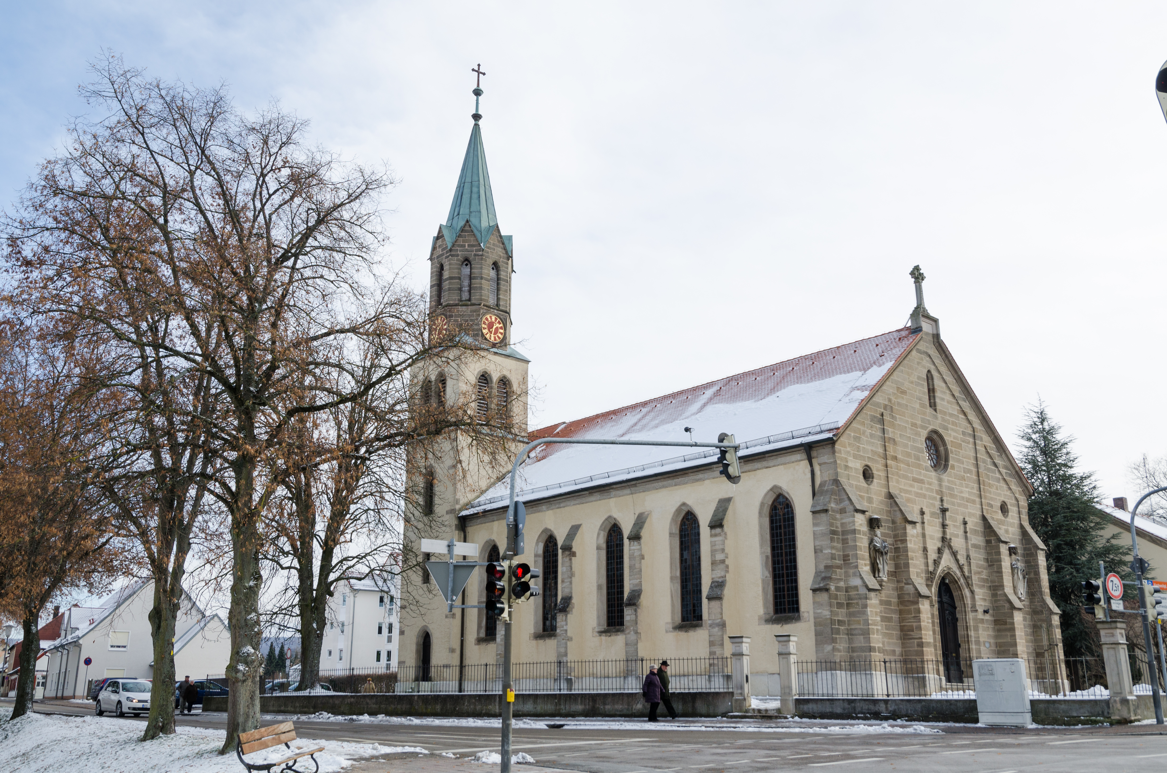 kath. Kirche St. Willibald (Weißenburg in Bayern)